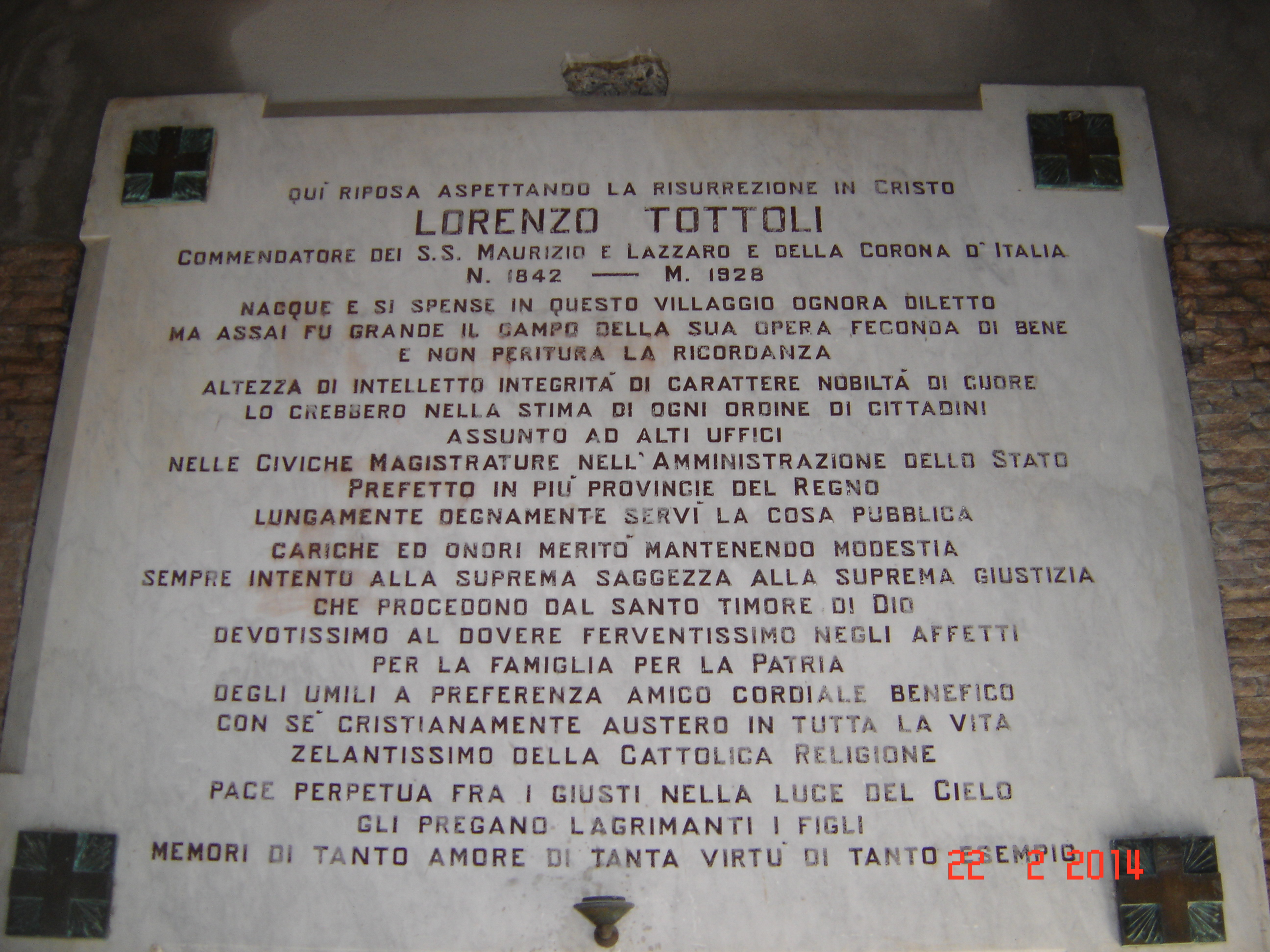 Epigrafe dedicata al Commendator Lorenzo Tottoli in Prestine (BS)